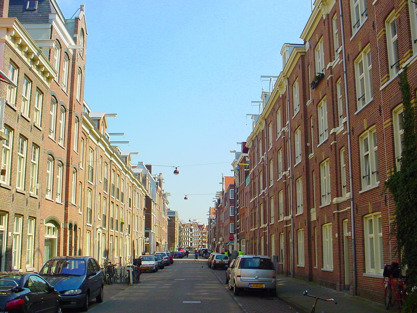 Willemsstraat Amsterdam Hamerwoningen, verhuurd door Ymere. Over het blok rechts: ongeveer op de plaats van het Klooster, de Metselaars- en Pijpenbrandersgang zijn in 1878 deze 64 woningen gebouwd. Merendeels eenkamerwoningen die ruggelings aan elkaar waren gelegen, waarbij de achterwoningen echter geen eigen trap en voordeur aan het achterterrein hadden. Zo kon het zijn dat er bij drie van de vijf voordeuren 16 deurbellen waren te vinden.